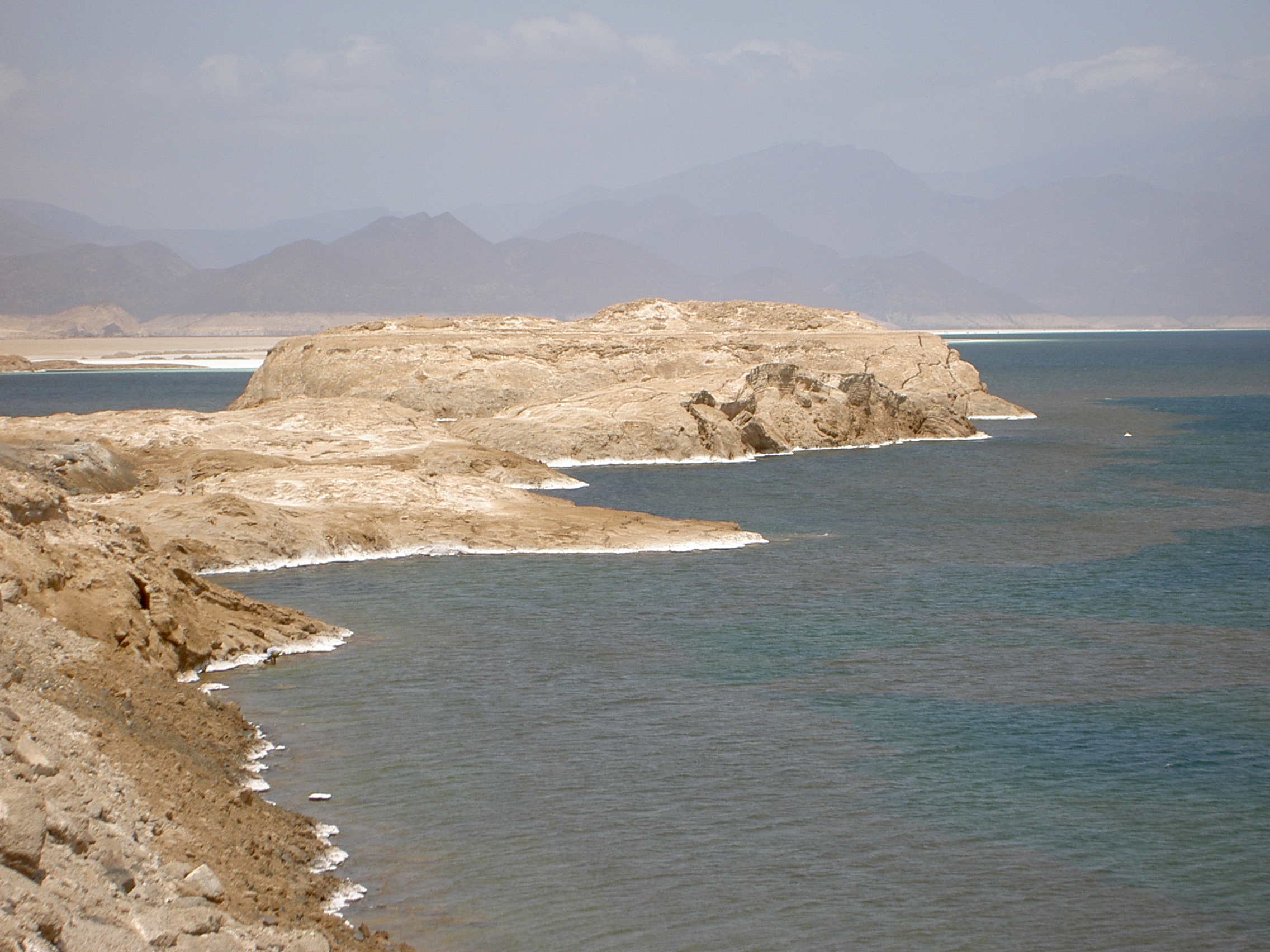 Lake Assal, Djibouti